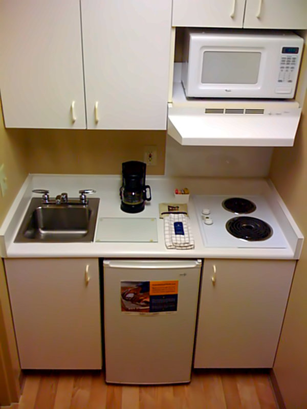 Kochnische, mit einer kleinen Einbauküche mit minimaler Ausstattung (Spüle, Kühlschrank, 2 Kochplatten, Dunsthaube, Mikrowelle). Hier in einem Hotel in Salem in Oregon, USA.